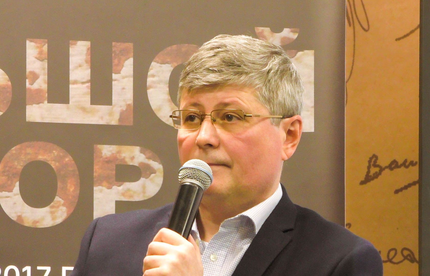 16.10.2017. Московский Дом Книги, Музей истории ГУЛАГа и Фонд Памяти .